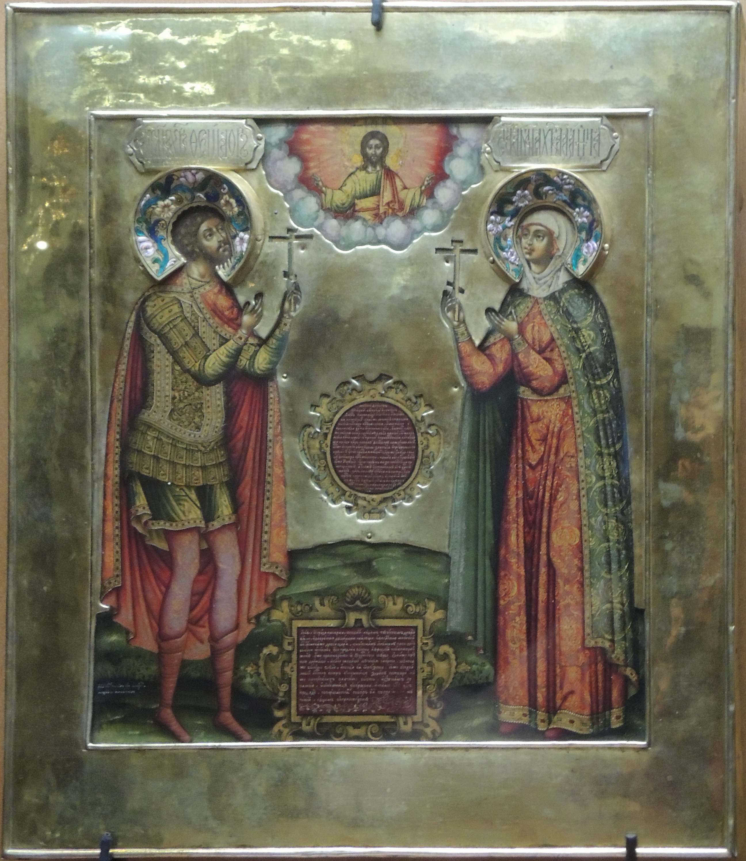 Федор Стратилат и великомученица Агафья. Патрональная икона царя Федора Алексеевича и царицы Агафьи. 1681, Мастера Оружейной палаты. ГИМ. (Вклад царя Федора Алексеевича и царицы Агафьи Семеновны Грушецкой в Александровский Успенский монастырь)